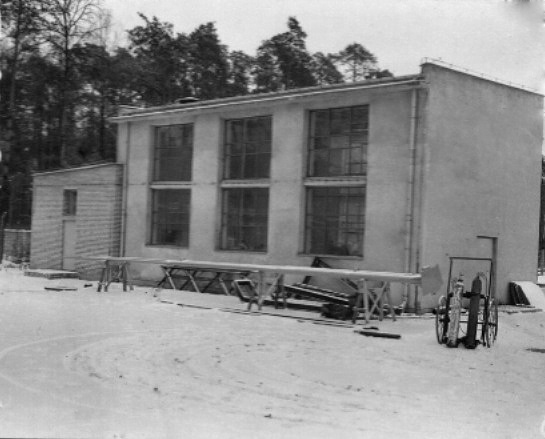 Hala produkcyjna Przedsiębiorstwa Montażowego „Montoerg”